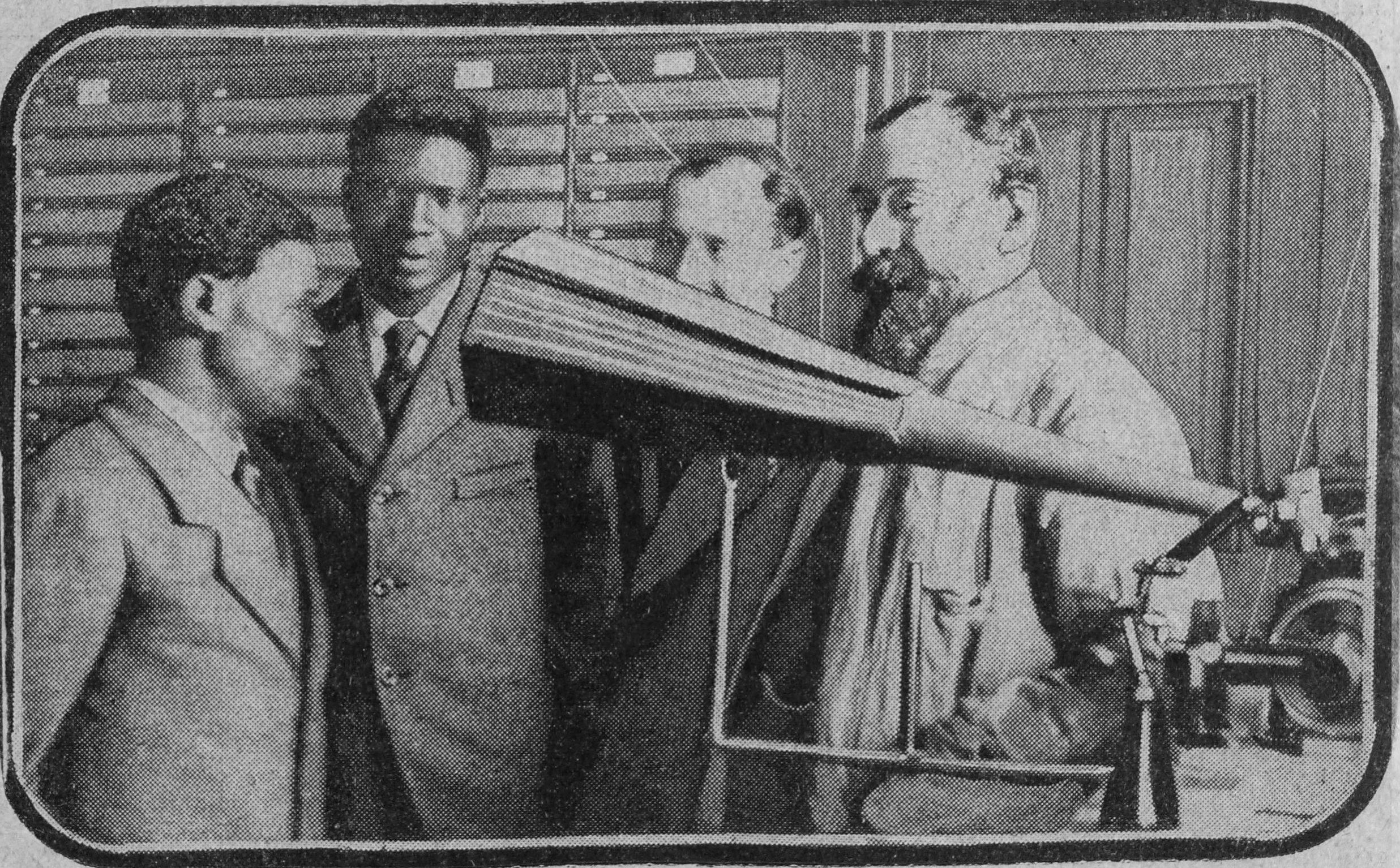 "Le professeur Brunot vient de faire enregistrer, pour les Archives de la parole, la voix de deux nègres venus de l'hinterland de l'Angola avec le comte de Rohan-Chabot."